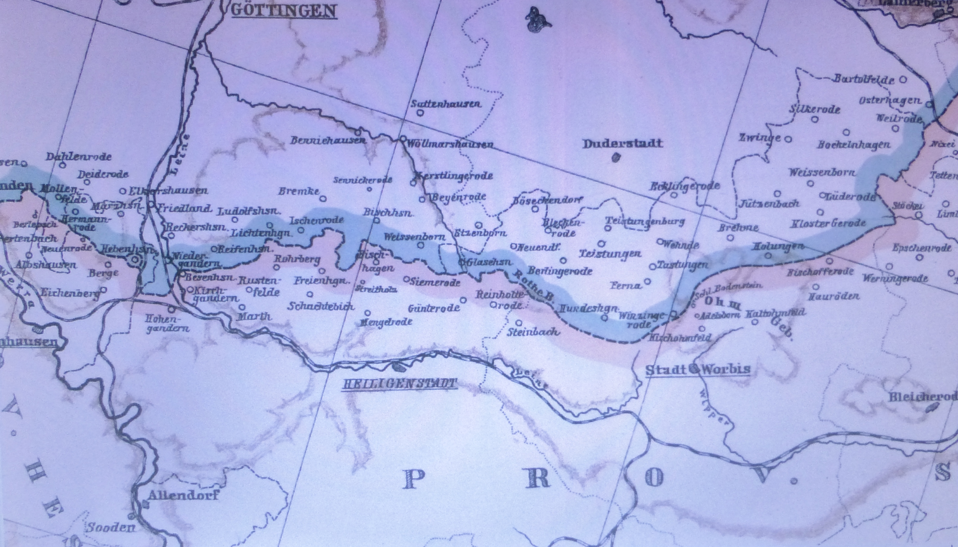 B.Haushalter: Die Sprachgrenze zwischen Mittel- und Niederdeutsch (von Hedemünden an der Werra bis Stassfurt an der Bode) 1883, Tausch und Grosse Halle (mit Karte im Gebiet des Eichsfeldes)